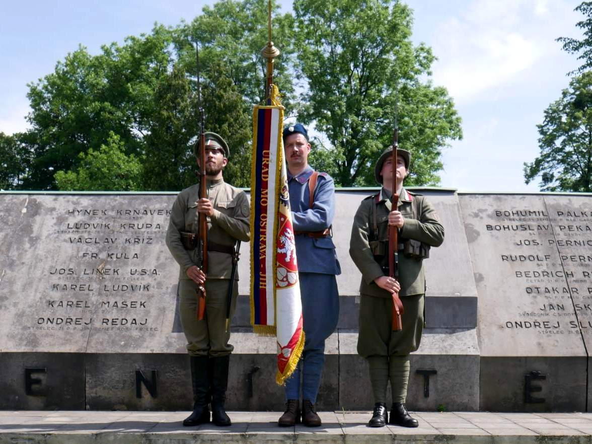 Stráž praporu jednoty ČsOL Ostrava 1 v historických stejnokrojích čs. legií v Rusku, Francii a Itálii.